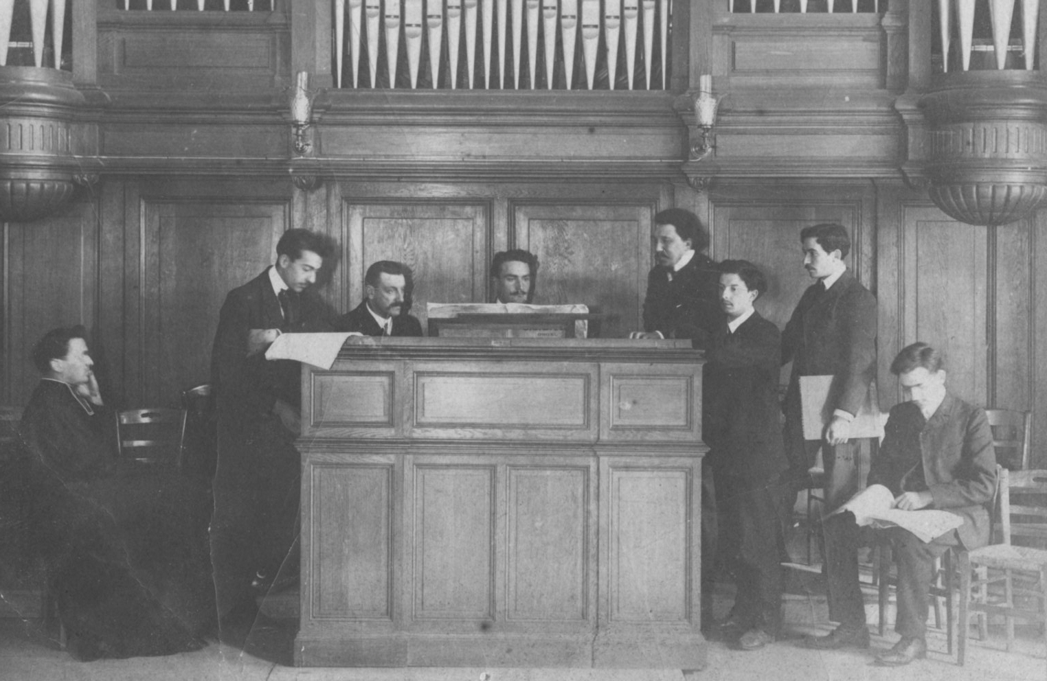 Un cours d'orgue à la Scola Cantorum. Decaux est le troisième en partant de la gauche.